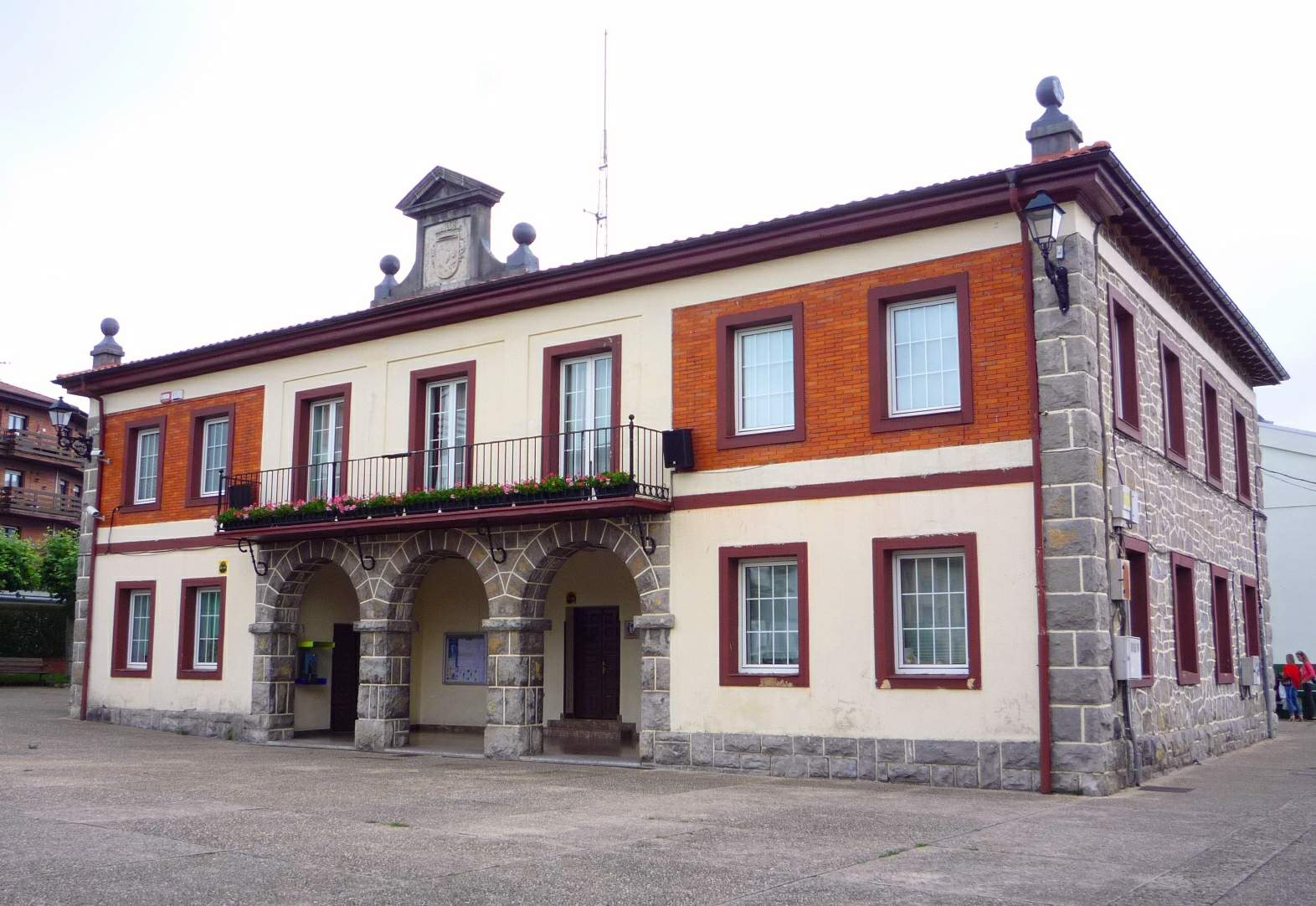 Ayuntamiento de Urkabustaiz (Izarra, Álava)